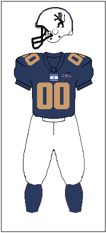 תלבושת לקבוצת ירושלים ליונס